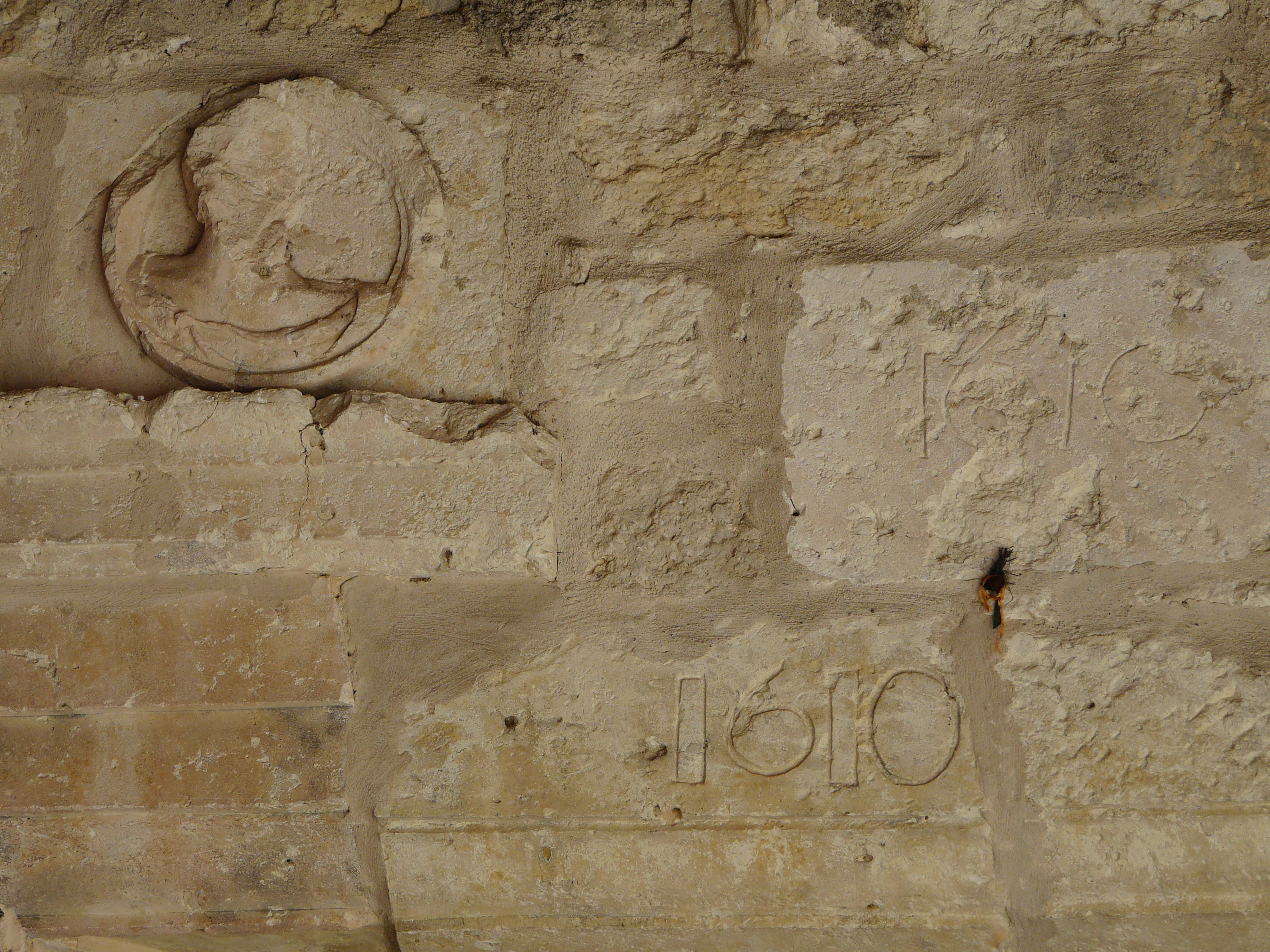 Bas-relief et date (1610) au-dessus du portail de l'église Notre-Dame, Montagnac-sur-Auvignon, Lot-et-Garonne, France.